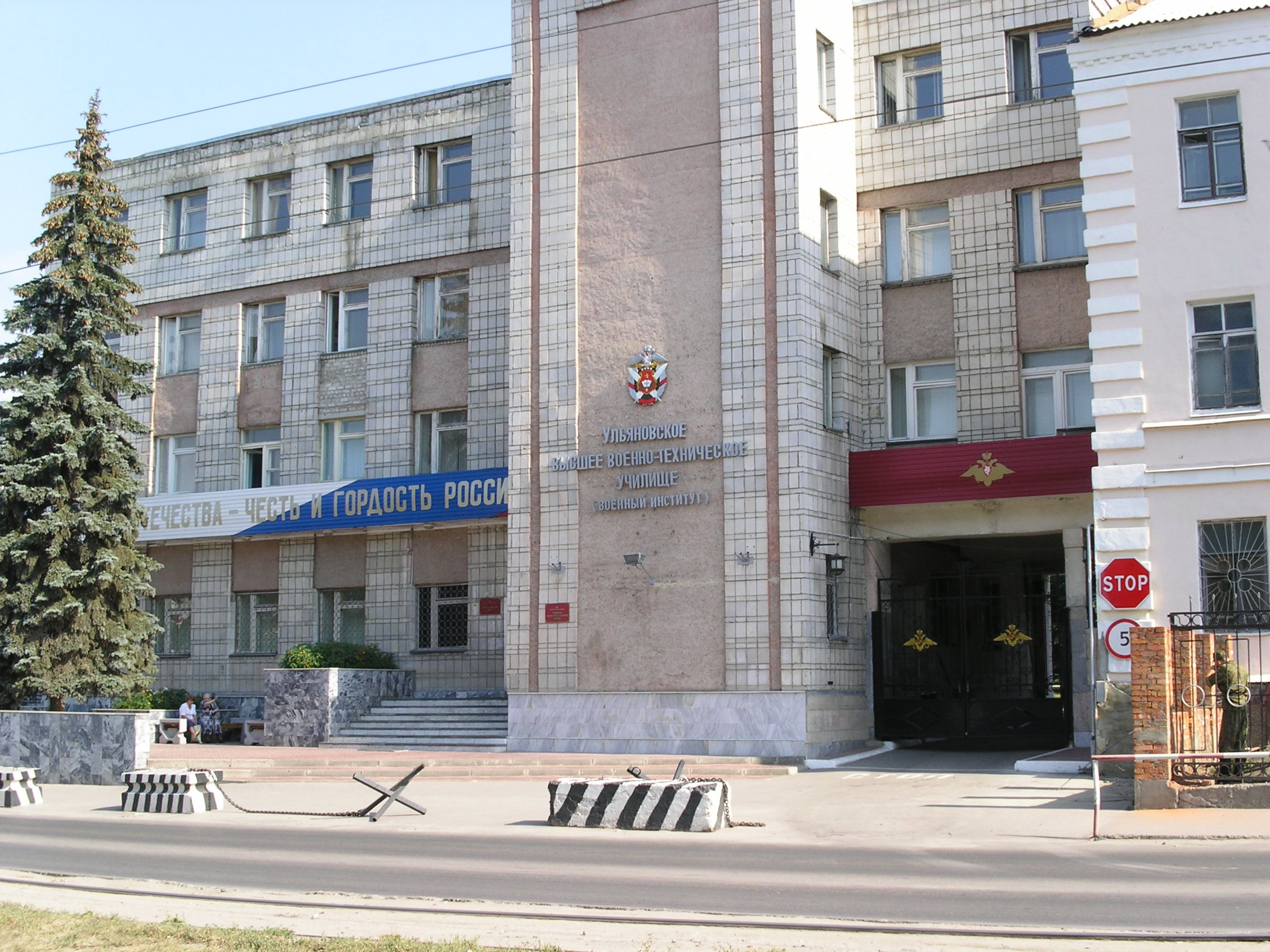 Собственная работа. Снимок сделан в 2007 году